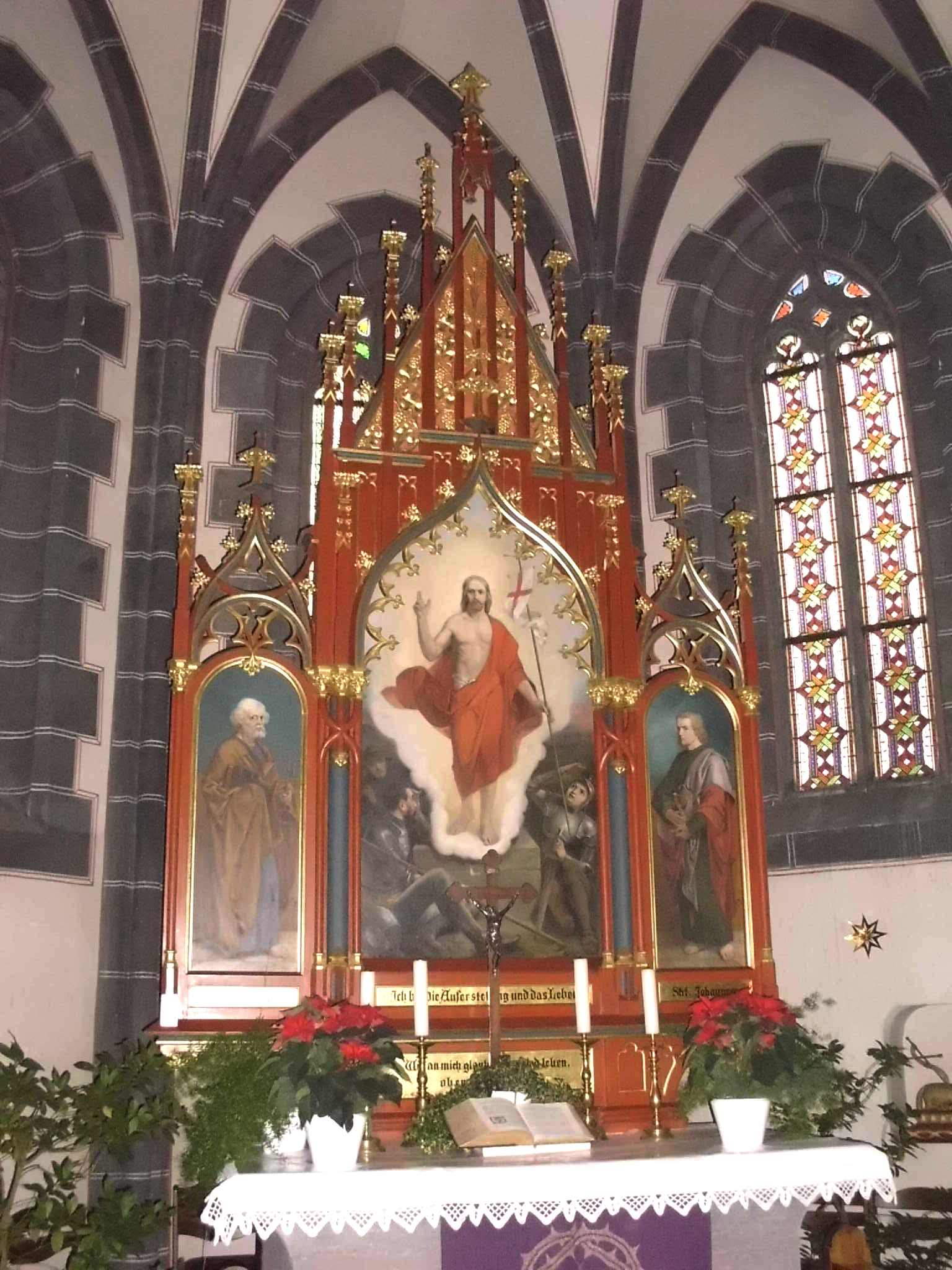 Evang. Kirche St. Jodokus in Gunzenhausen-Unterwurmbach, Landkreis Weißenburg-Gunzenhausen (Bayern), neugotischer Altar